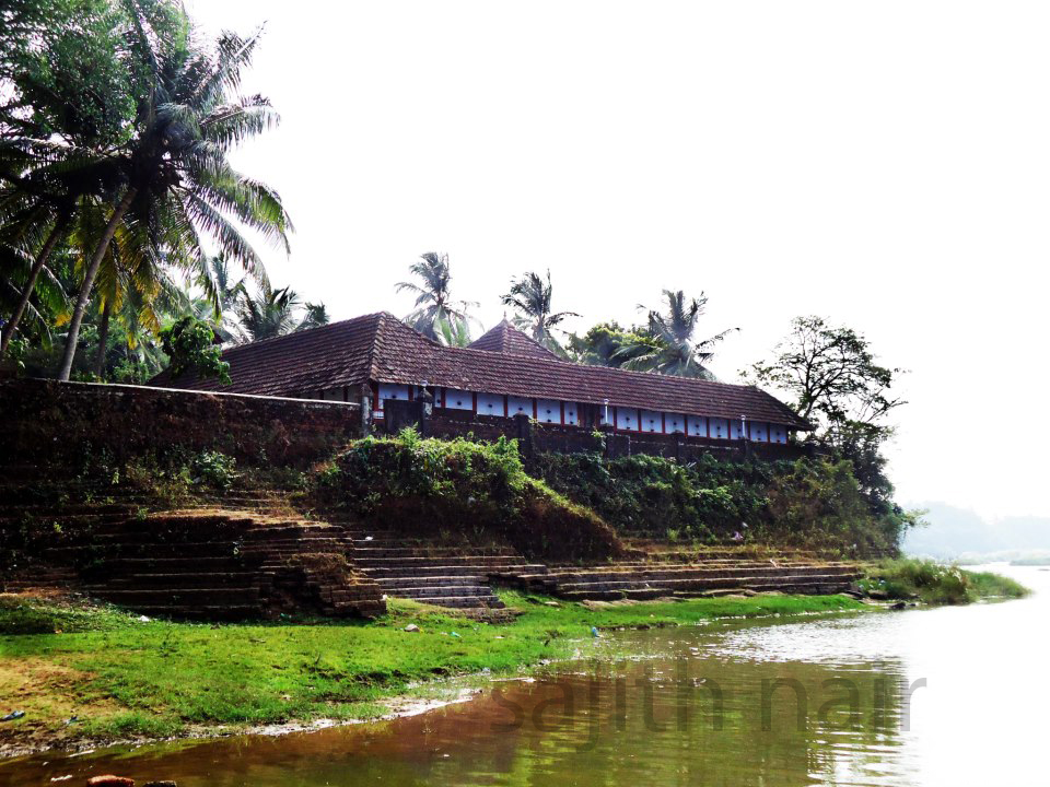 ത്രിമൂര്‍ത്തി സംഗമം കൊണ്ട് കാശിക്ക് ശേഷം അനുഗ്രഹീതമായ ഭാരതത്തിലെ മറ്റൊരു പുണ്ണ്യ സ്ഥലമാണ് തവനൂര്‍. ........... സൃഷ്ടി ,സ്ഥിതി,സംഹാര മൂര്‍ത്തികളായ ഭഗവാന്‍ ബ്രഹ്മാവും,വിഷ്ണുവും,ശിവനും ഇവിടെ ഭാരത പുഴയോരത്കു ടികൊള്ളുന്നു. ഇവിടെ ബ്രഹ്മ ശിവ ക്ഷേത്രം ഭാരത പുഴയുടെ തെക്കു വശത്തും(തവനൂര്‍ ശ്രീ ചെറുതിരുനാവായ ക്ഷേത്രം) വിഷ്ണു ക്ഷേത്രം (തിരുന്നാവായ ശ്രീ നവാമുകുന്ന്ദ്ധ ക്ഷേത്രം)ഭാരത പുഴയുടെ വടക്കു വശത്തും സ്ഥിതി ചെയ്യുന്നു.ഈ ക്ഷേത്ര സന്നിതിയിലൂടെ ഒഴുകുന്ന നിളാ നദി ഭഗവാന്‍ ശിവന്‍റെ ജടയില്‍ നിന്നും ഉദ്ഭവിച്ചതാണന്നാണ് ഐതീഹ്യം.മാത്രമല്ല ഇവടത്തെ ബ്രഹ്മ ക്ഷേത്രം ലോകത്തിലെ തന്നെ നിത്യ പൂജ ഉള്ള അപൂര്‍വ്വം ചില ബ്രഹ്മമ ക്ഷേത്രങ്ങളില്‍ ഒന്നാകുന്നു.ഭഗവാന്‍ ശിവന്‍ ഗംഗാ സമേതനായും,ഭഗവാന്‍ ബ്രഹ്മ്മാവ് സരസ്വതി സമേതനായും,ഭഗവാന്‍ വിഷ്ണു ലക്ഷ്മി സമേതനായും കുടികൊള്ളുന്നു.തന്മൂലം നിലാ നദീ തീരത്തെ ഈ പുണ്ണ്യ സന്നിധി "തെക്കന്‍കാശി"എന്നും അറിയ പെടുന്നു.ബലി കര്‍മ്മ അനുഷ്ട്ടാനങ്ങള്‍ക്ക് കാശിയോളം തന്നെ പ്രാധന്ന്യവും അര്‍ഹിക്കുന്നു.